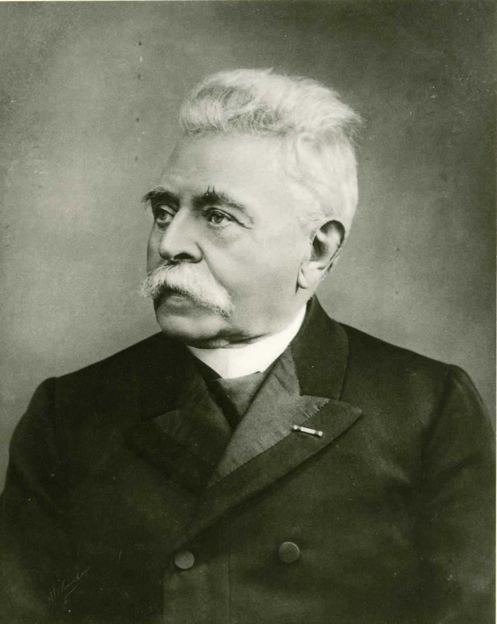 Portret van Jan Schepel, burgemeester van Winsum